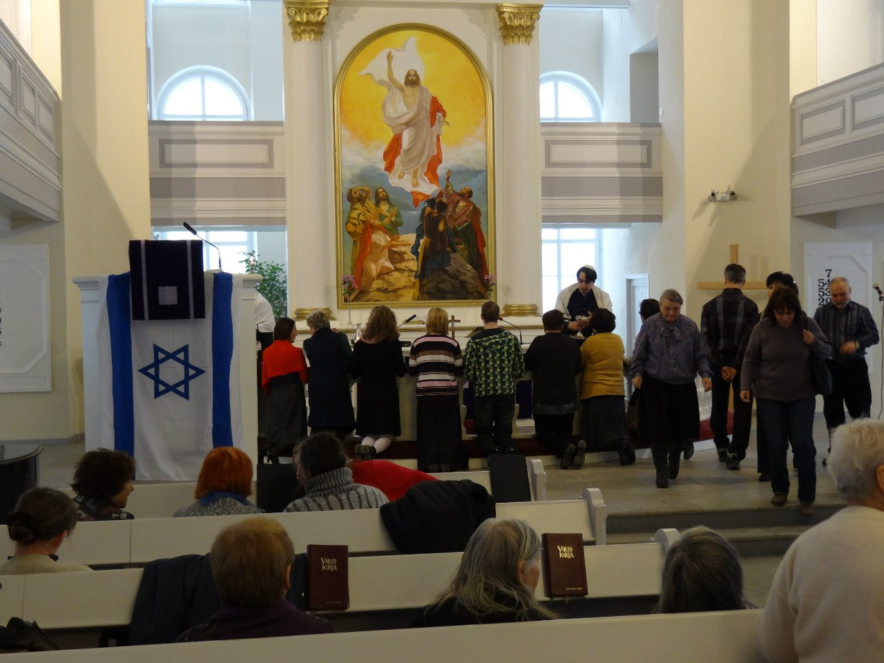 judo-christian service in memory of Purim in S-Petersburg Lutheran Church of St.Mary (Russia)